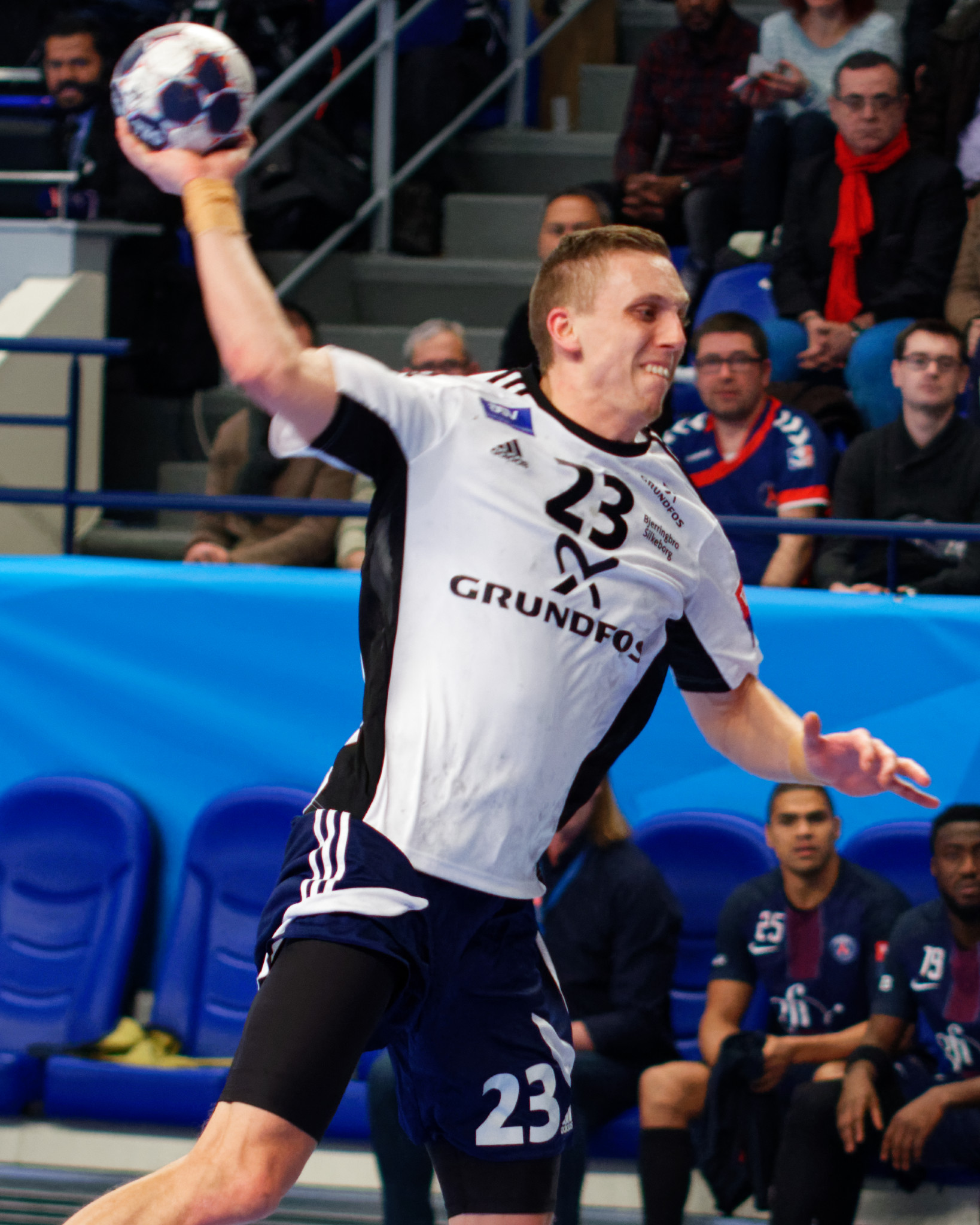 Rencontre de phase de groupe de la ligue des champions 2016-17 entre le PSG et Bjerringbro-Silkeborg. A Coubertin, le 11 février 2017.